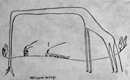 Последний жираф. Рисунок Ильи Ильфа